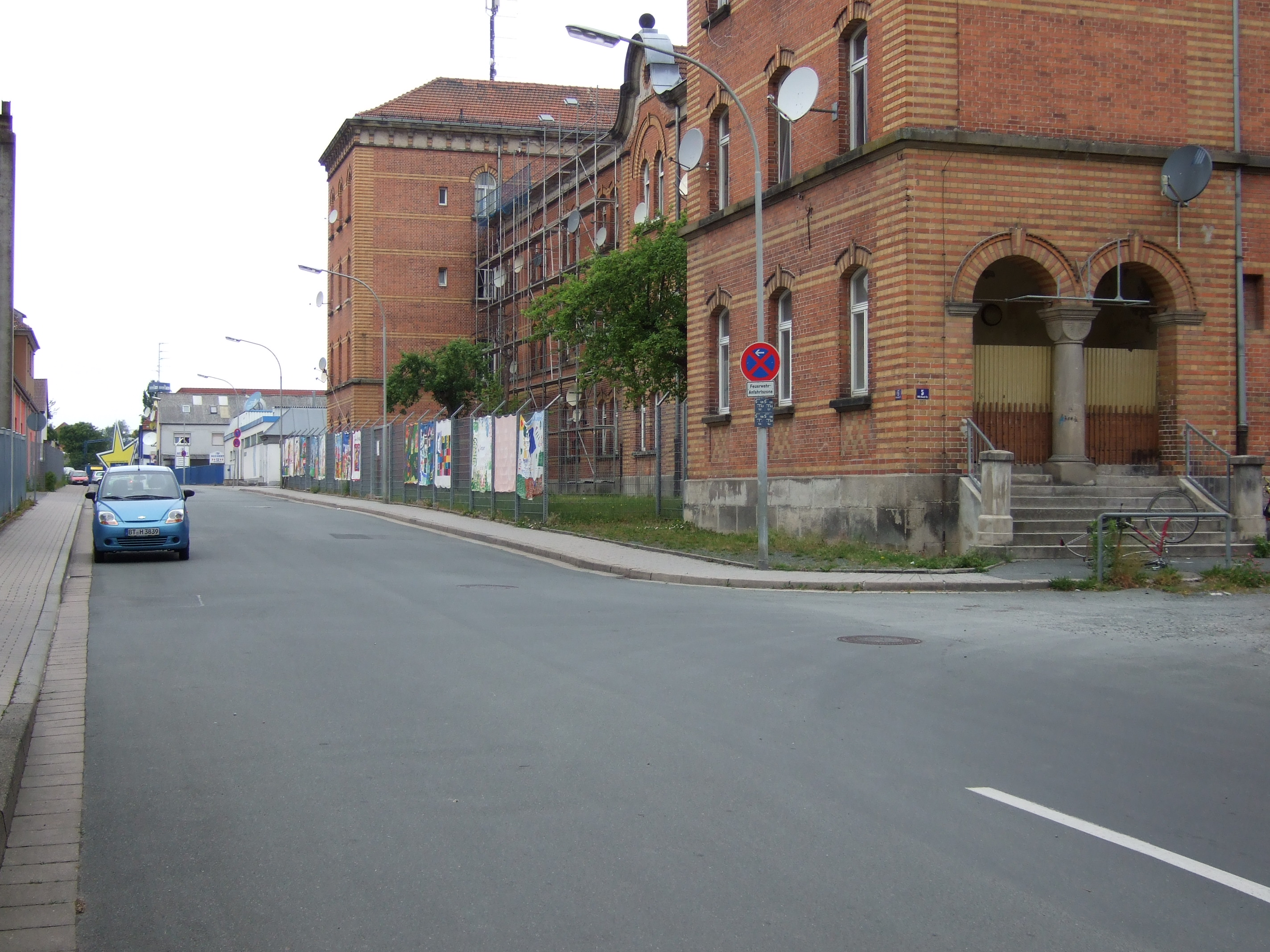 Wilhelm-Busch-Straße Bayreuth